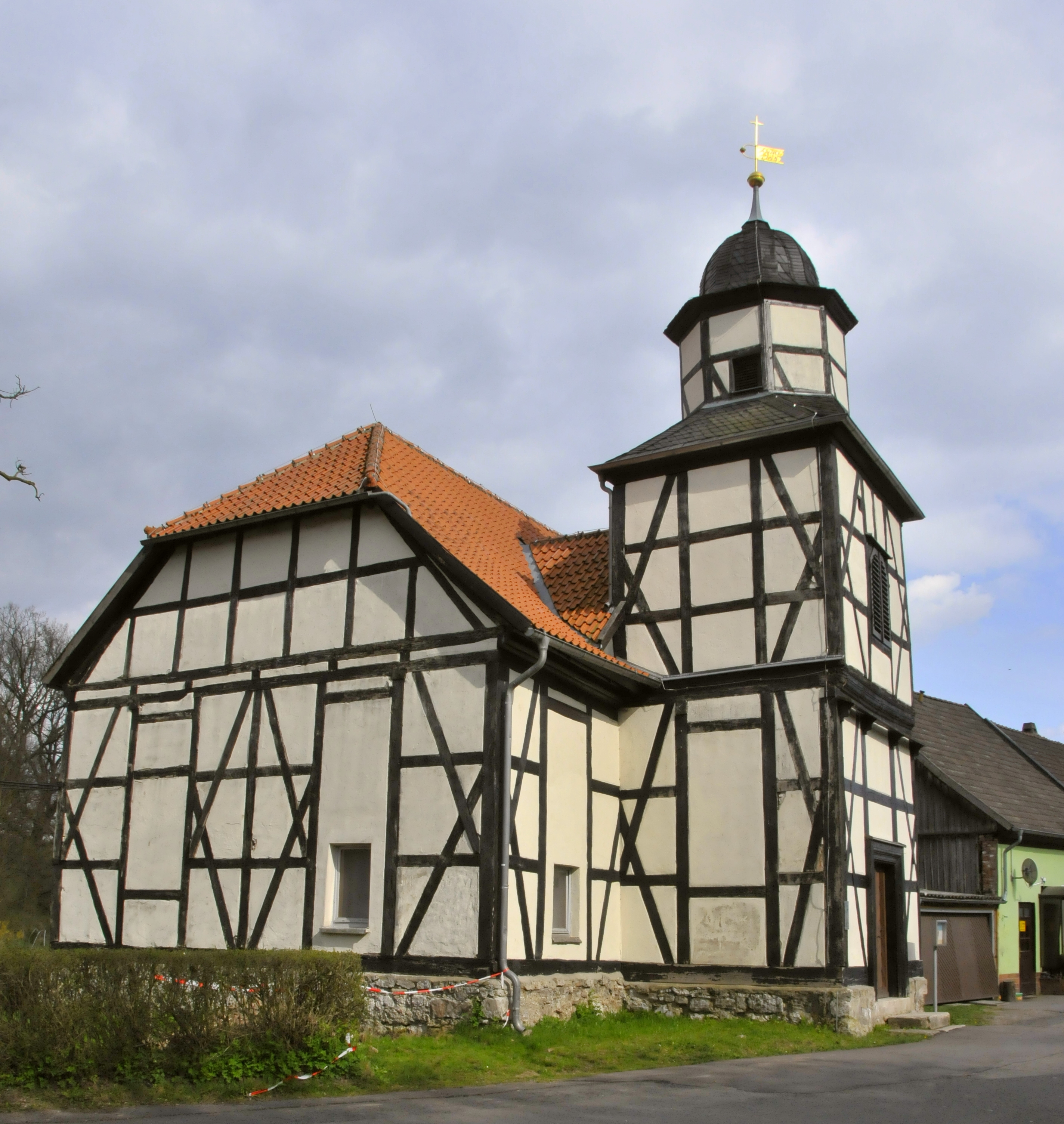 Holbach (Hohenstein), Ev. Filialkirche St.-Bartholomäus von 1745